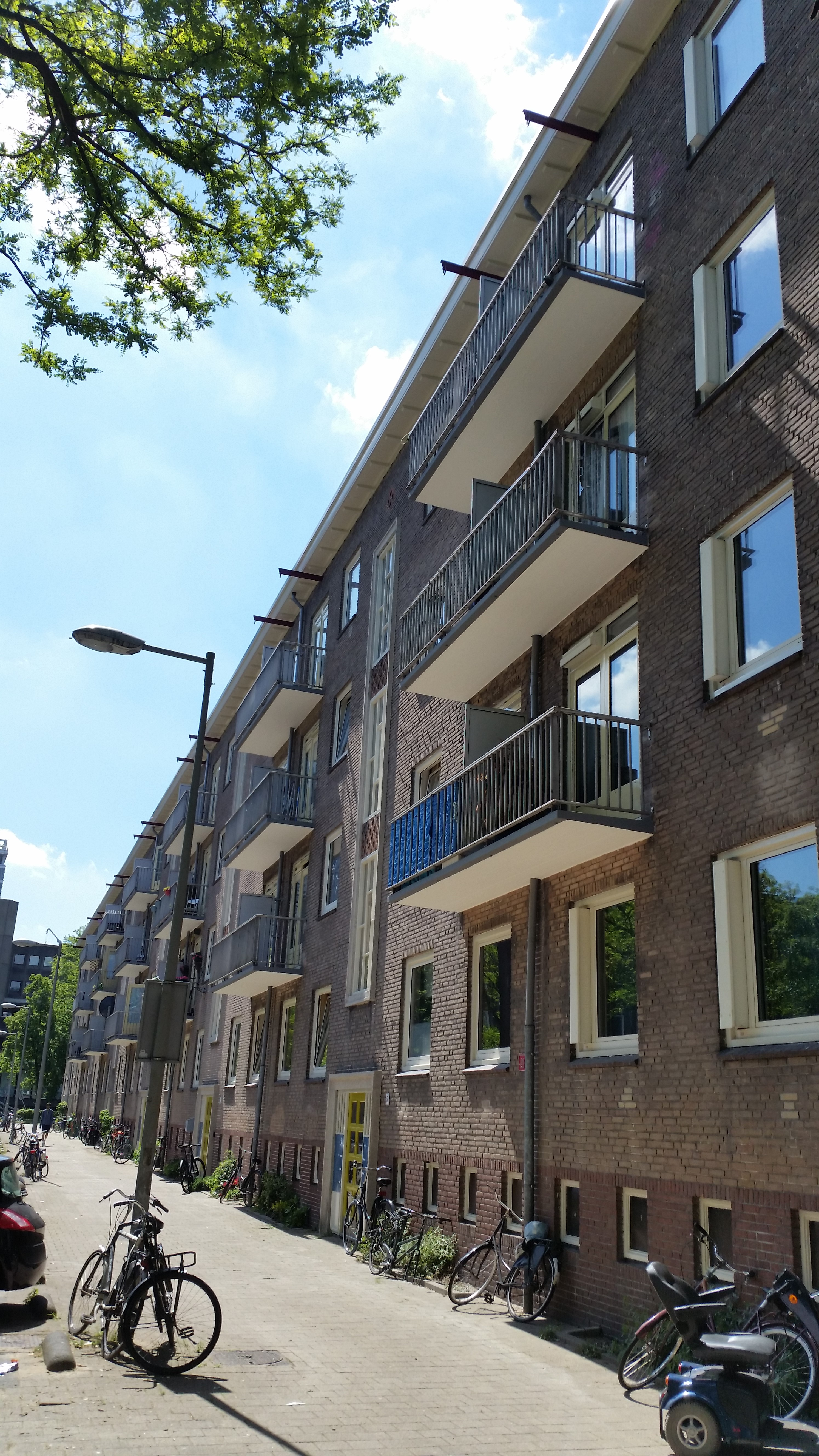 Impressie Van der Kunstraat, Amsterdam-Oost (mei 2020)